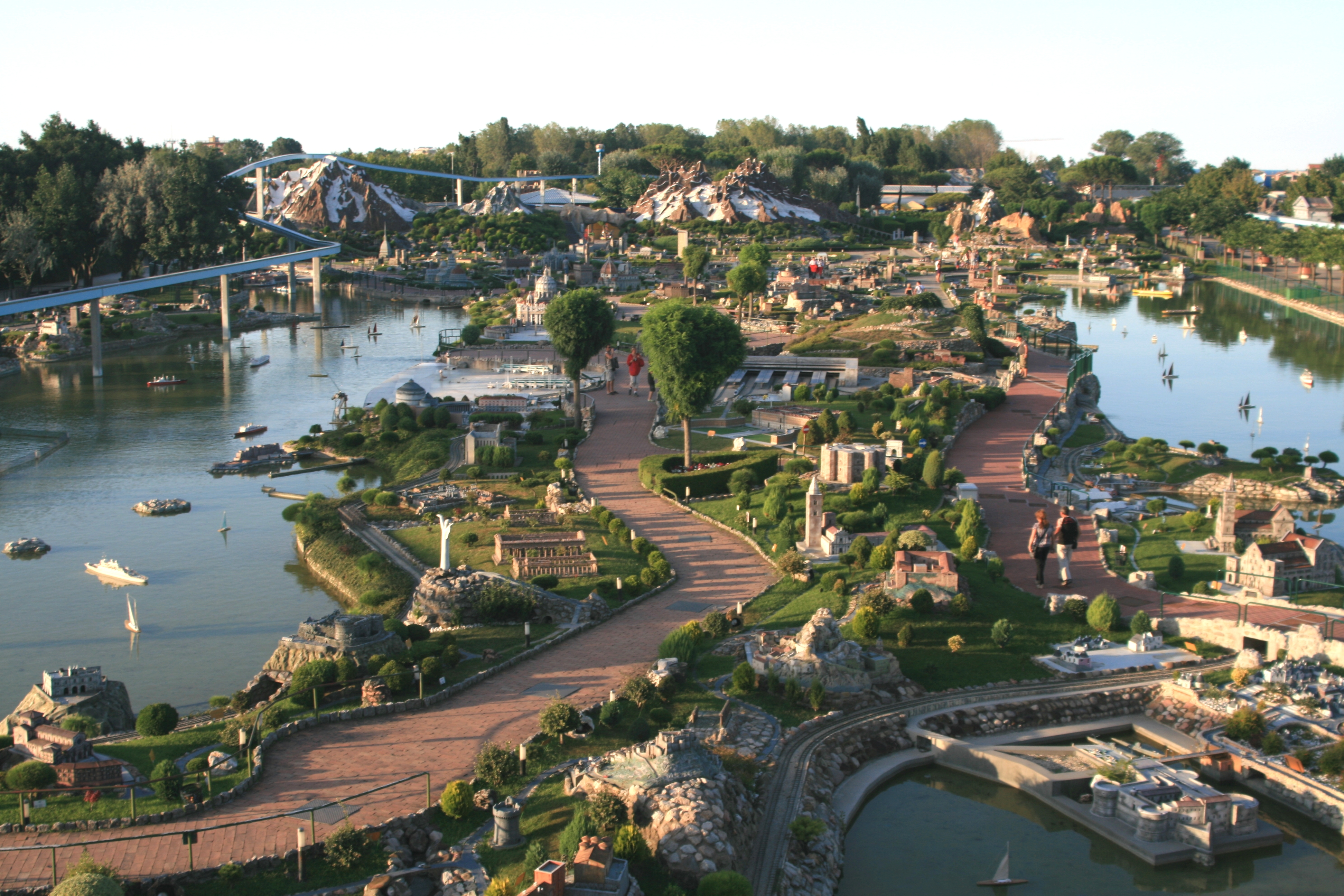 Italia in Miniatura